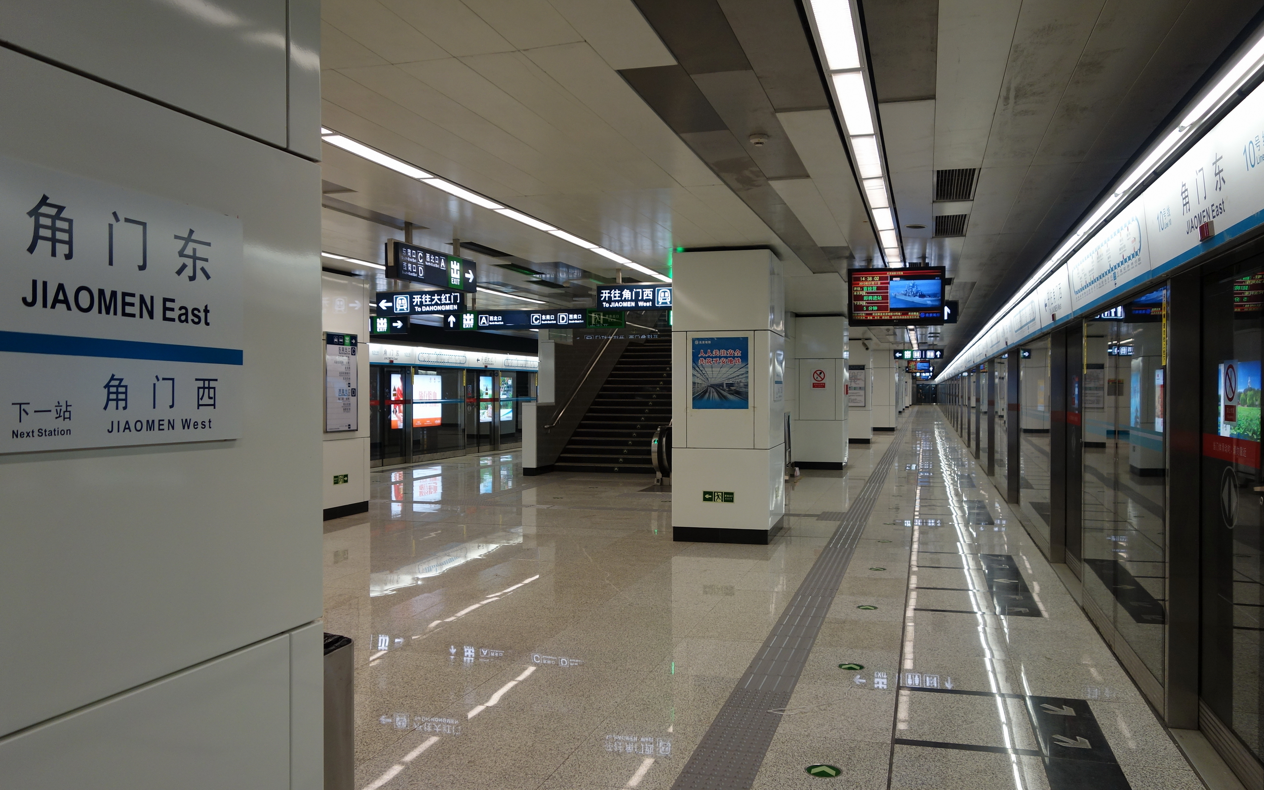 角门东站站台